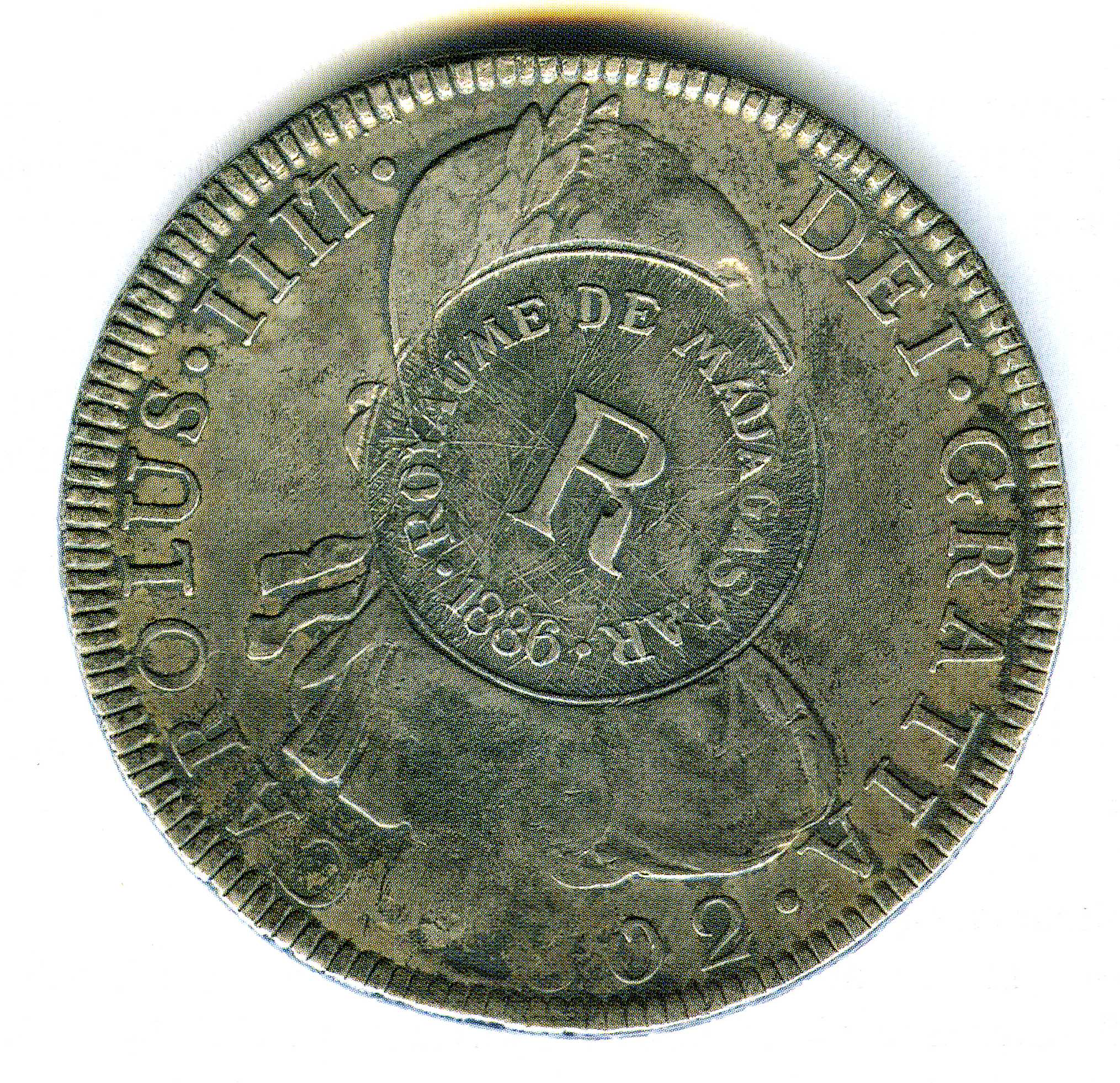 Moneda con resello para Madagascar.